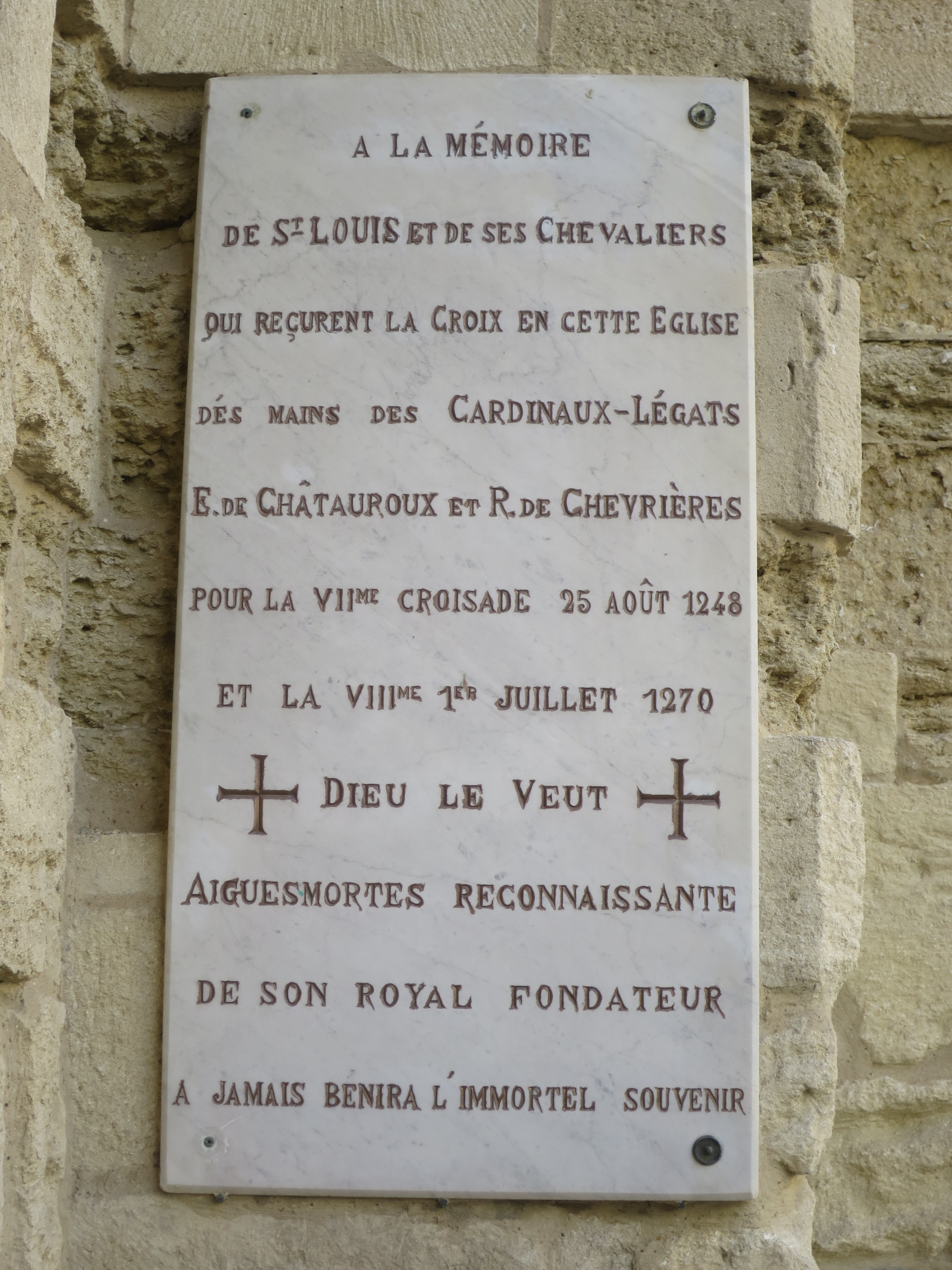 Gedenktafel an die beiden Kreuzzüge an der Kirche Notre-Dame des Sablons in Aigues-Mortes